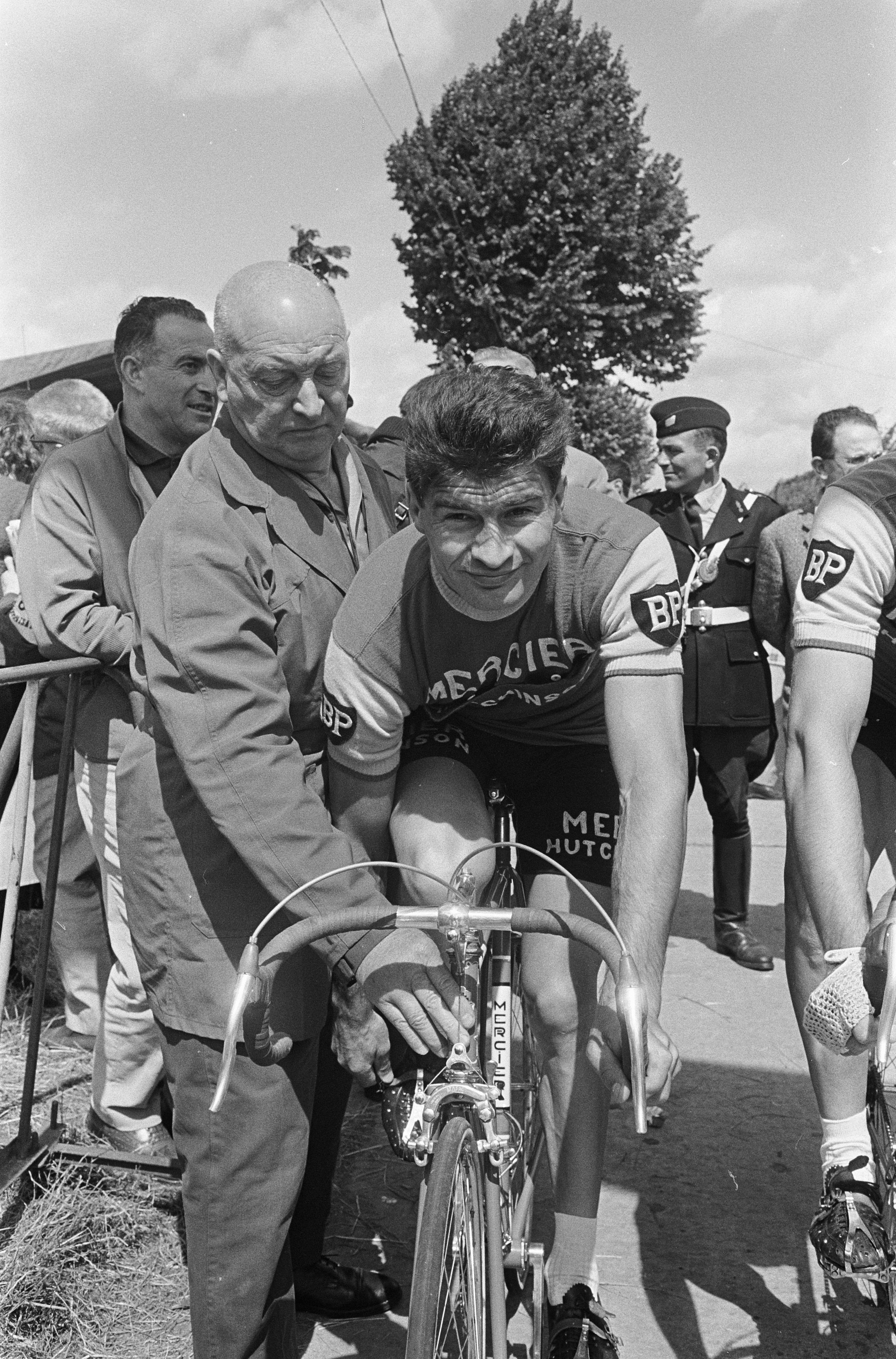 Collectie / Archief : Fotocollectie Anefo Reportage / Serie : [ onbekend ] Beschrijving : Tour de France , nummer 20 Poulidor in aktie Datum : 27 juni 1966 Trefwoorden : wielrennen Persoonsnaam : Poulidor, Raymond Fotograaf : Koch, Eric / Anefo Auteursrechthebbende : Nationaal Archief Materiaalsoort : Negatief (zwart/wit) Nummer archiefinventaris : bekijk toegang 2.24.01.05 Bestanddeelnummer : 919-3002